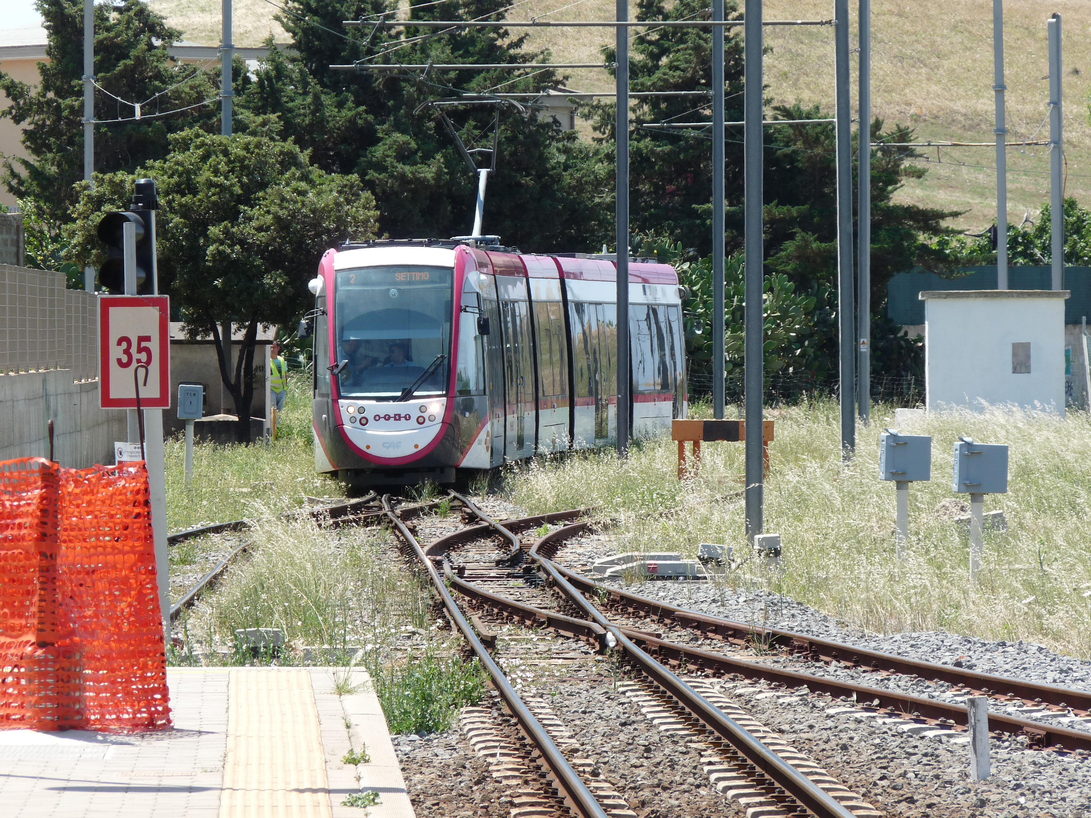 De Lijn 2 tram in Settimo San Pietro